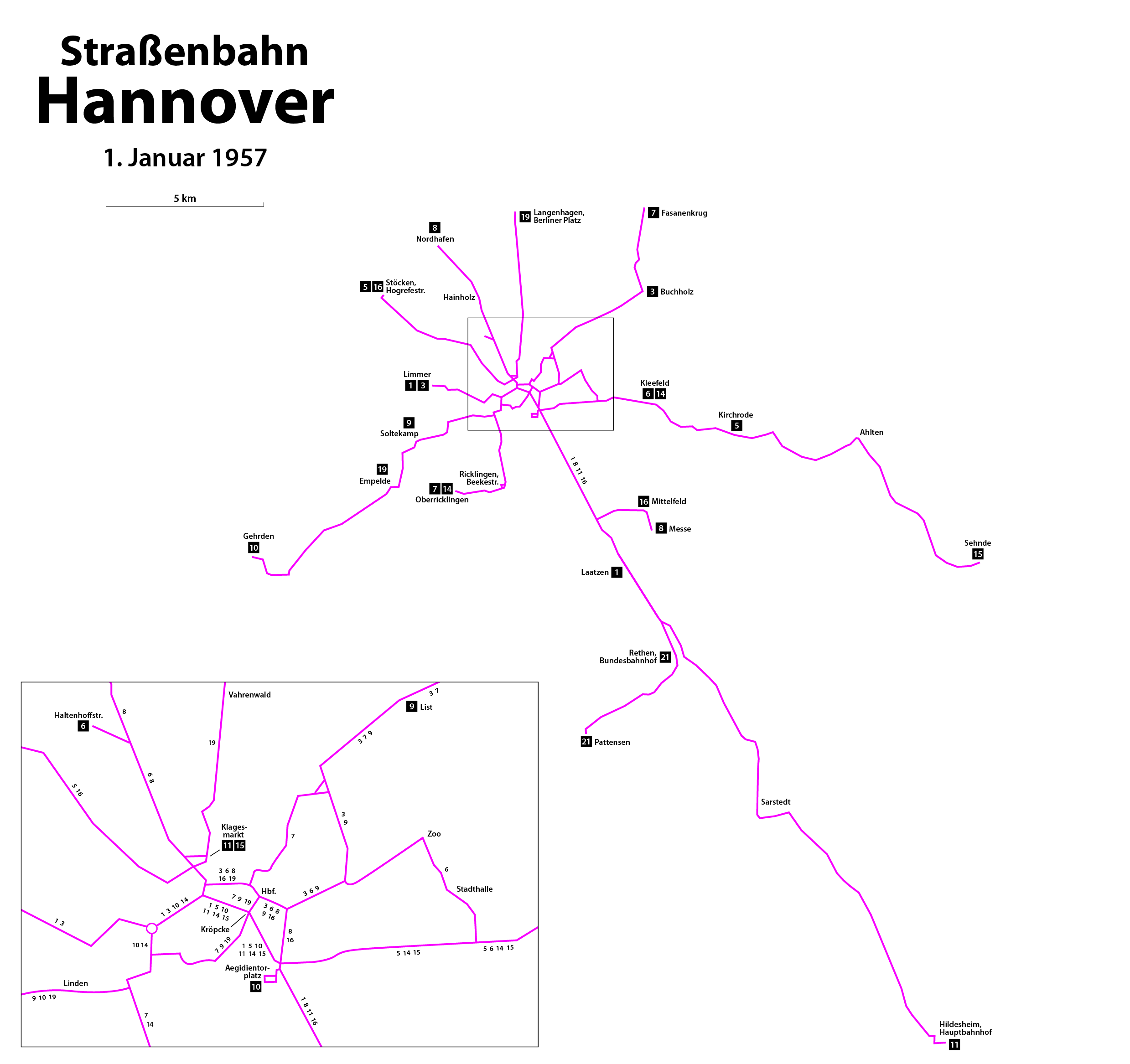 Karte der Straßenbahn Hannover im Jahr 1957